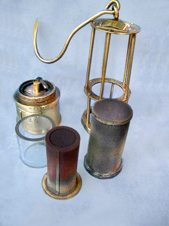 onderdelen benzinelamp. eigen foto t.b.v.artikel op site Mijnbouw-Nederlands-Limburg Hiervan ben ik de webmaster